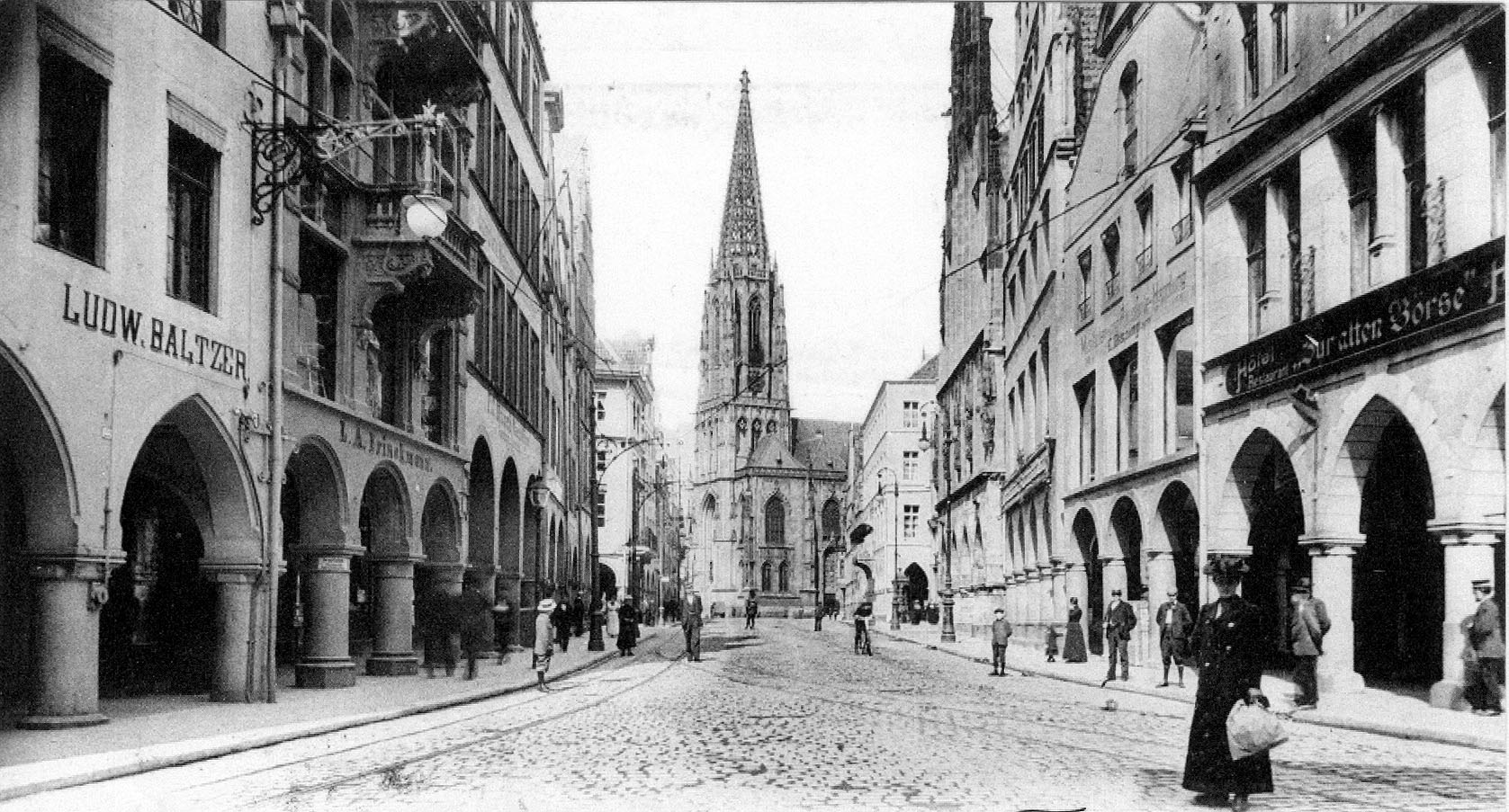 Münster, Blick auf den Principalmarkt um 1900